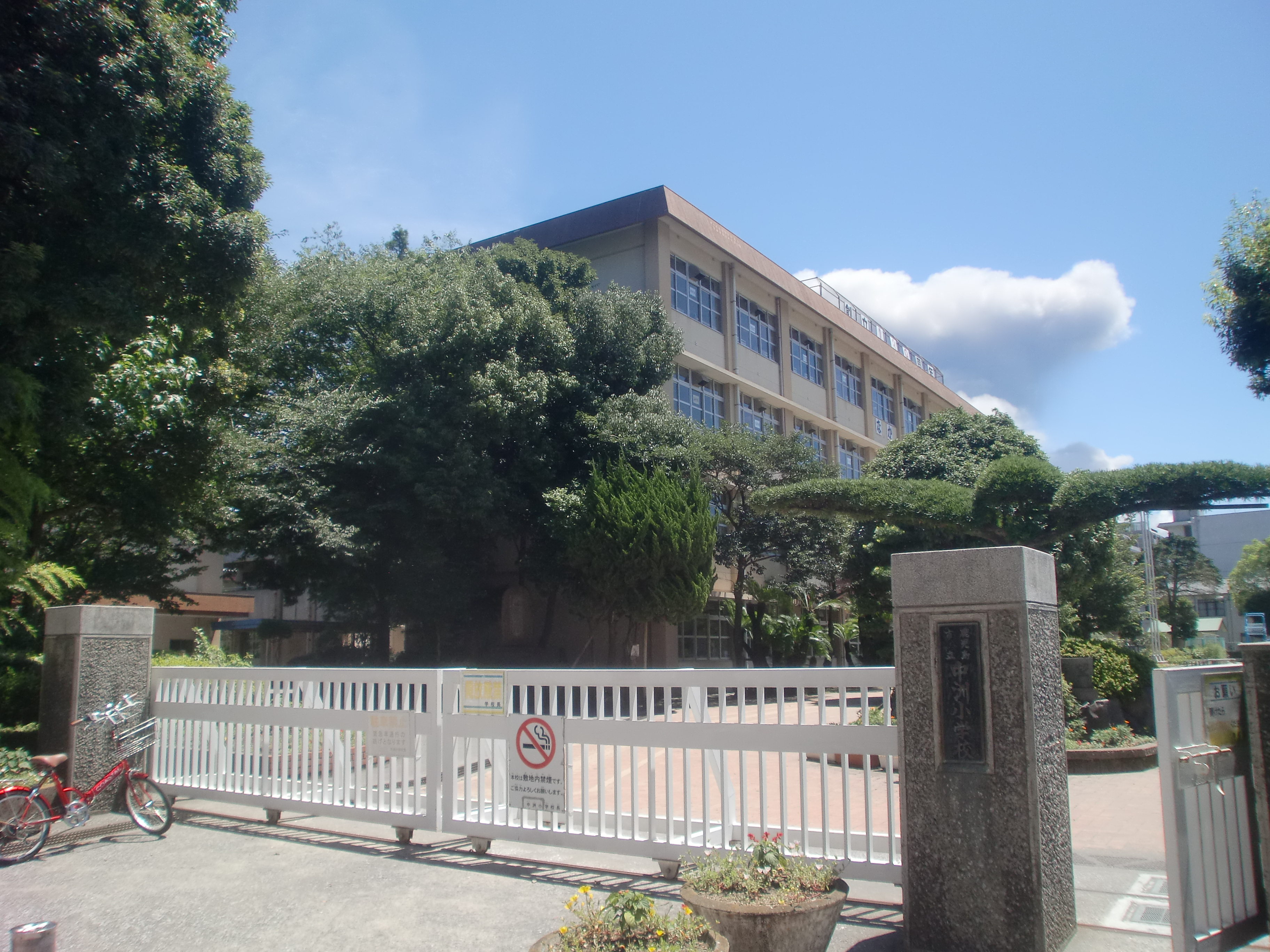 鹿児島市立中洲小学校の外観。